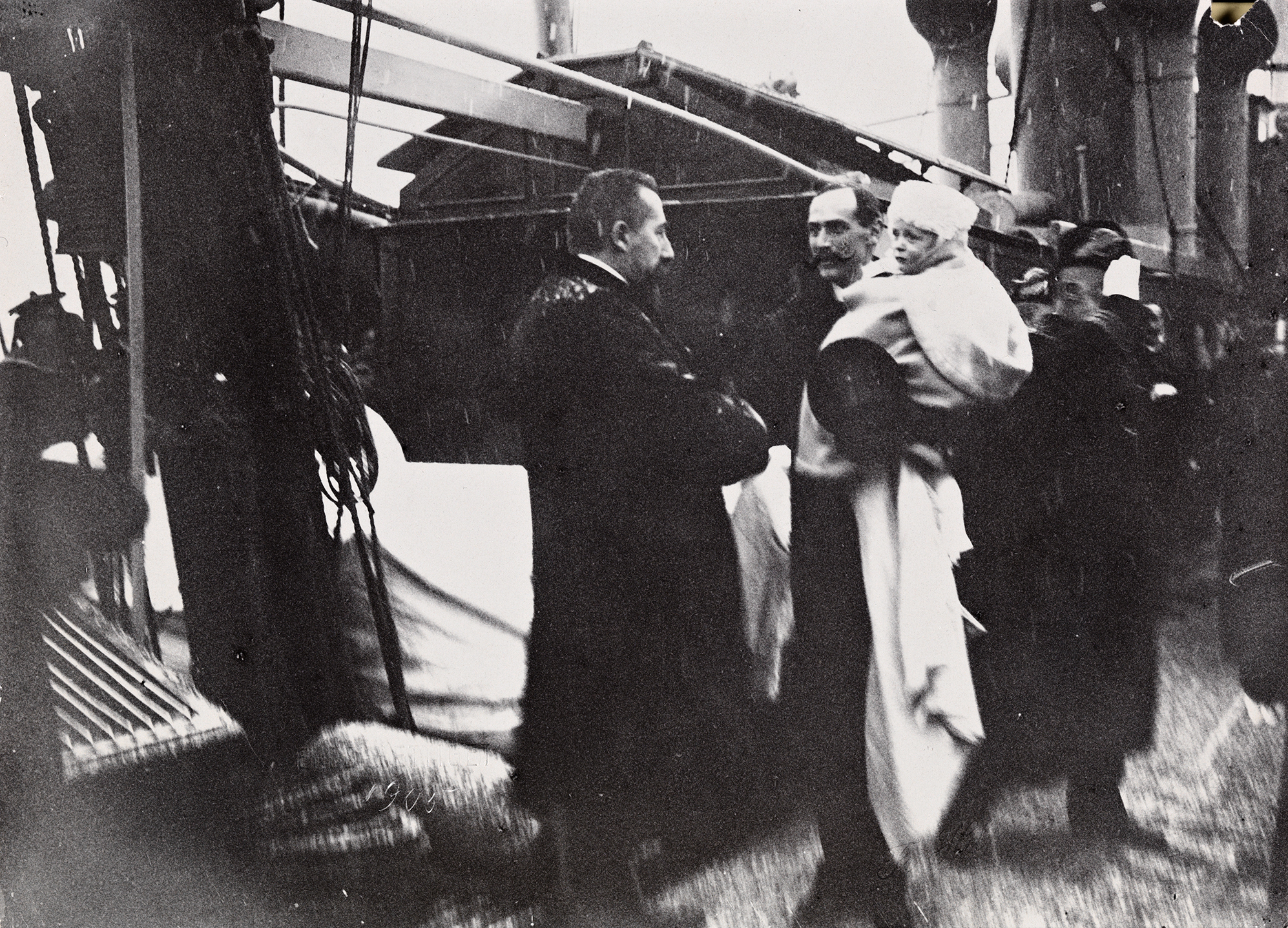 Statsminister Christian Michelsen mottar kong Haakon 7 og kronprins Olav ombord det norske marinefartøyet "Heimdal" Sted / Place: Oslo Bildesignatur / Image Number: bldsa_FA0232